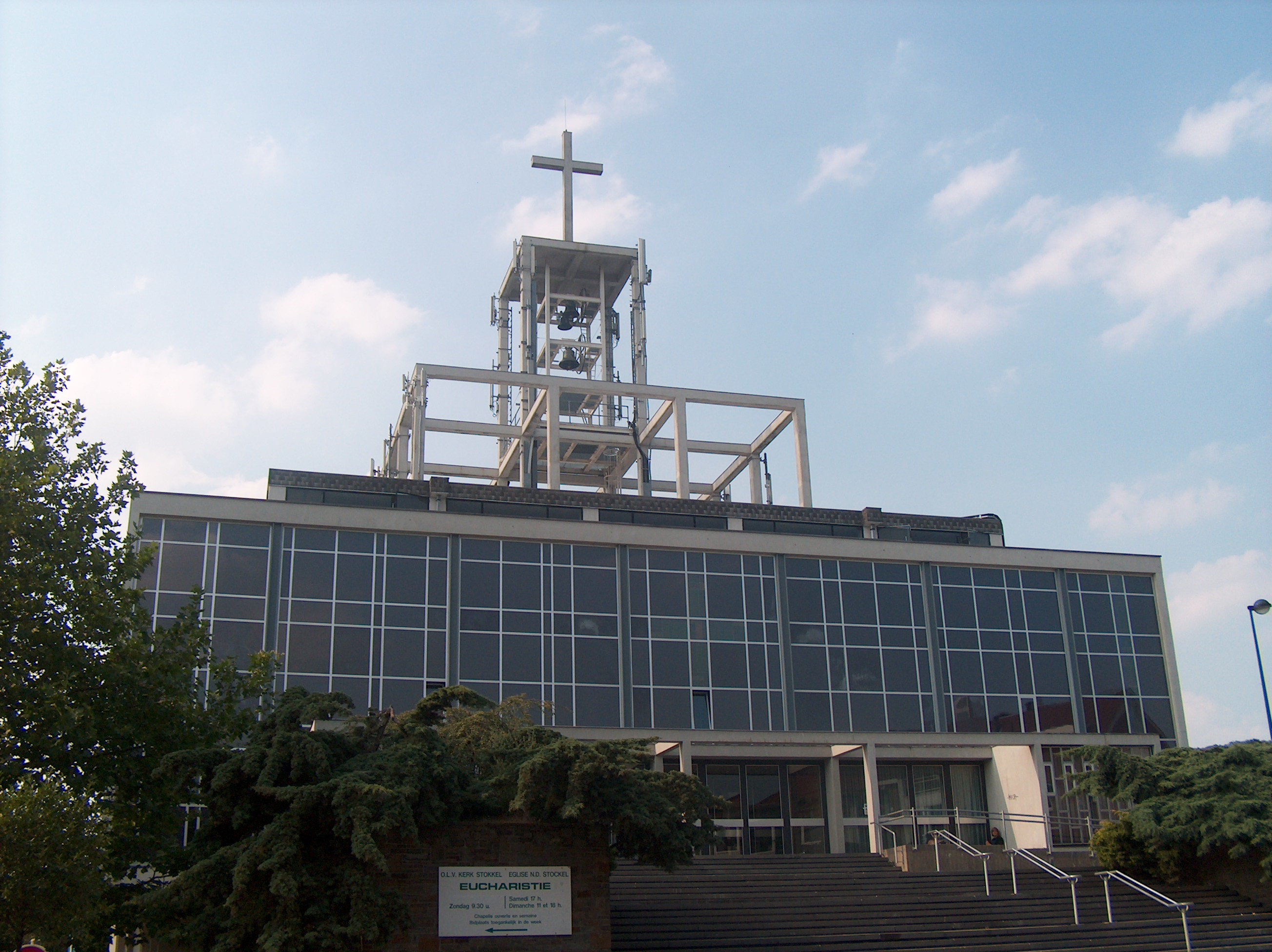 L'église Notre-Dame de Stockel, rue de l'Église à Woluwe-Saint-Pierre, Bruxelles, Belgique.